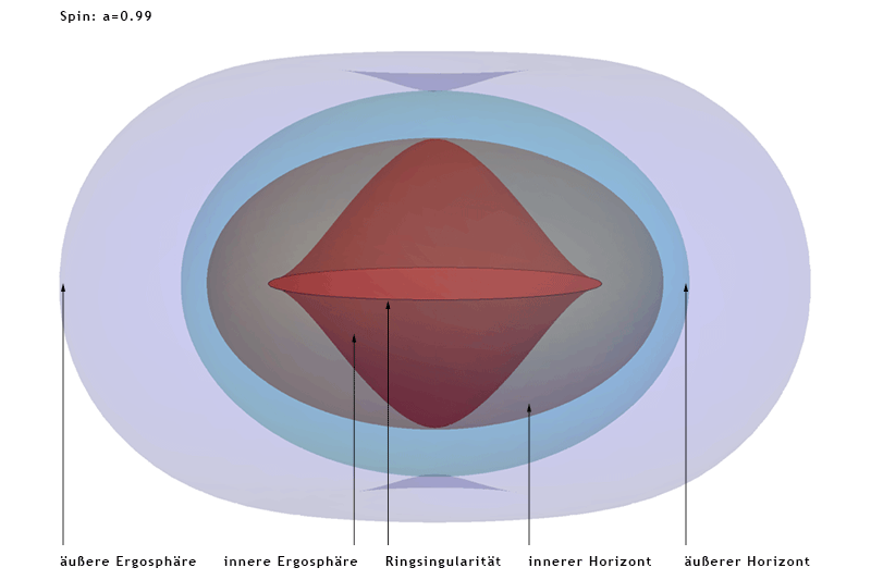 Ergosphären, Ereignishorizonte und Ringsingularität eines rotierenden schwarzen Lochs - Animation einschalten